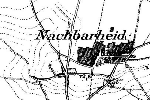 Neuaufnahme 1891-1912